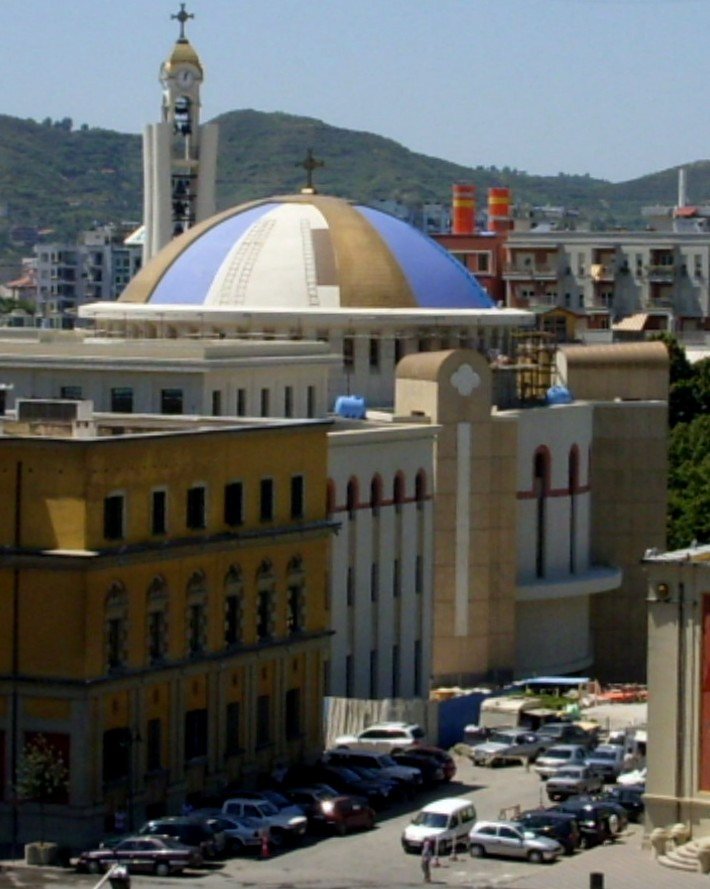 die neue im Bau befindliche orthodoxe Kathedrale im Zentrum der Hauptstadt Tirna. (Zustand im Juli 2010)